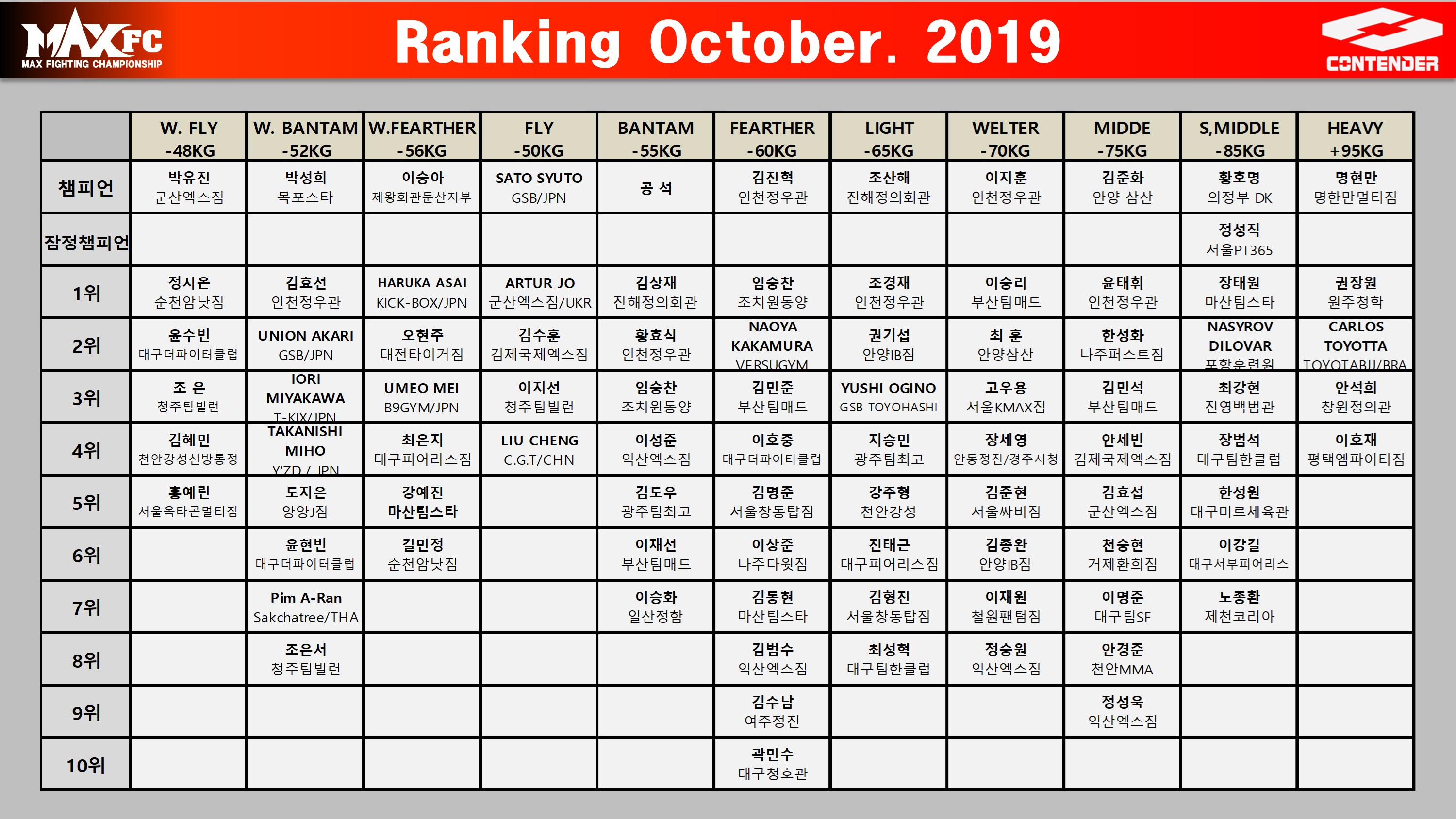 2019년 10월 MAX FC 랭킹